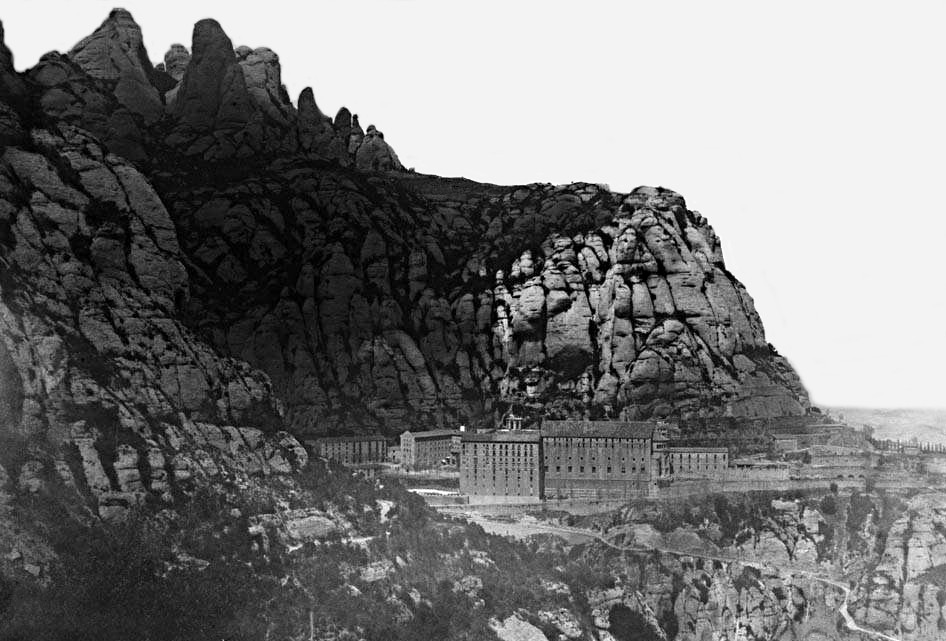 Imatge